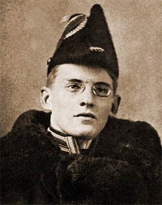 Александр Алехин в форме воспитанника Императорского училища правоведения